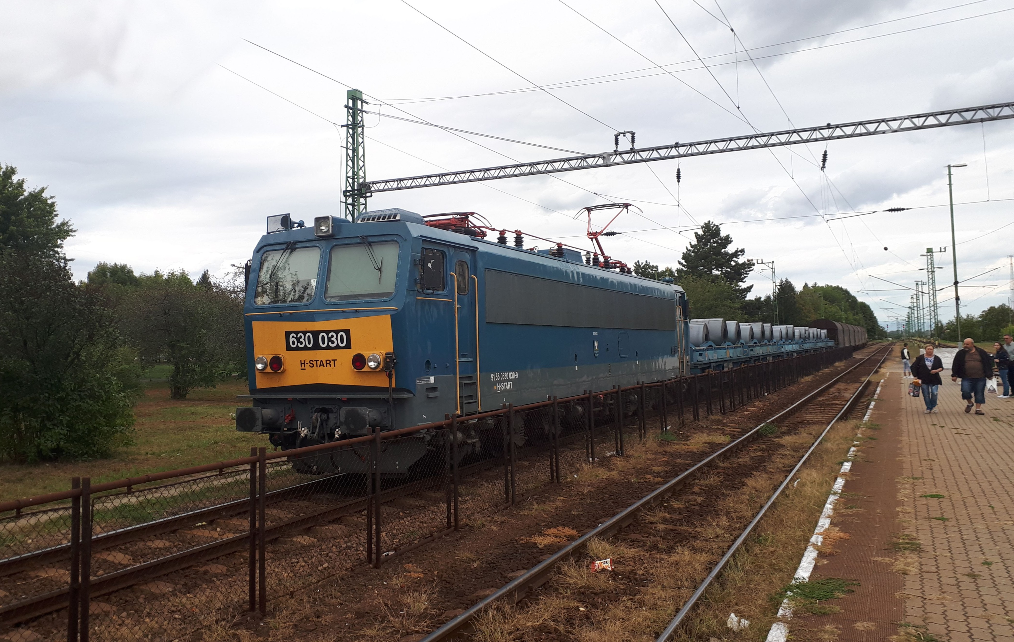 A V63 sorozatú, 030-as sorszámú mozdony áll tehervonatával Forró-Encs vasútállomáson, Miskolc felé fordulva